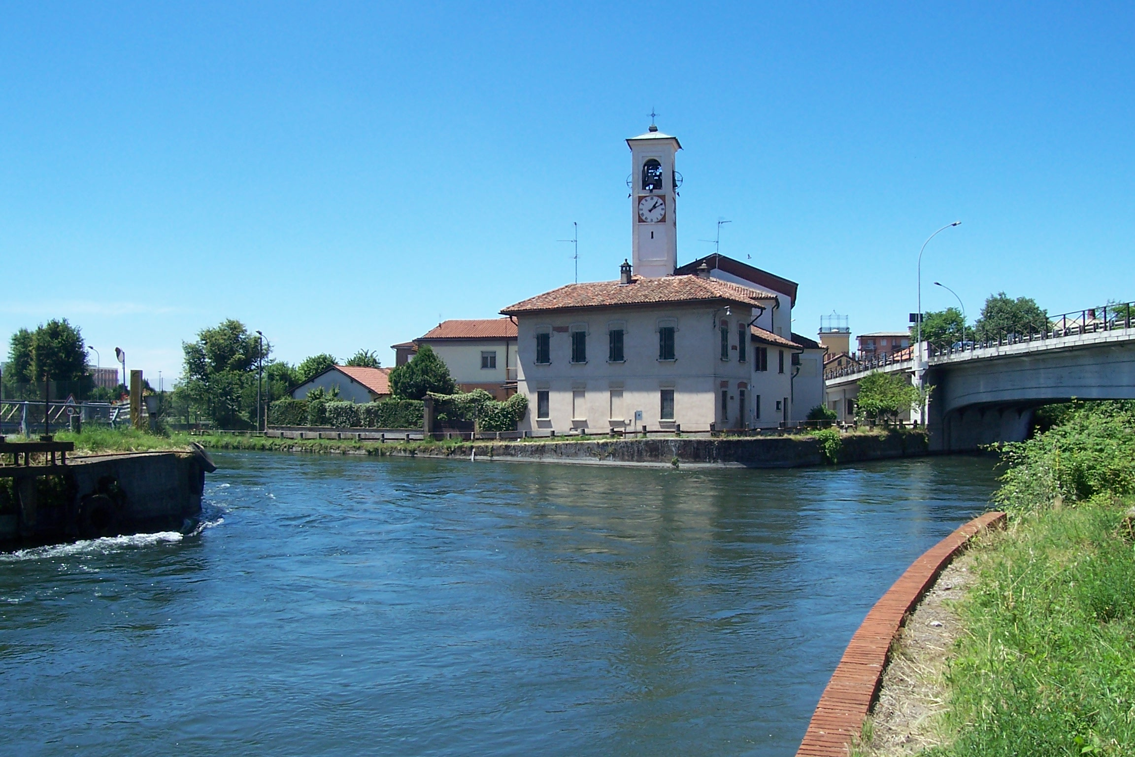 La confluenza del Naviglio di Bereguardo nel Naviglio Grande a Castelletto, fraz. di Abbiategrasso